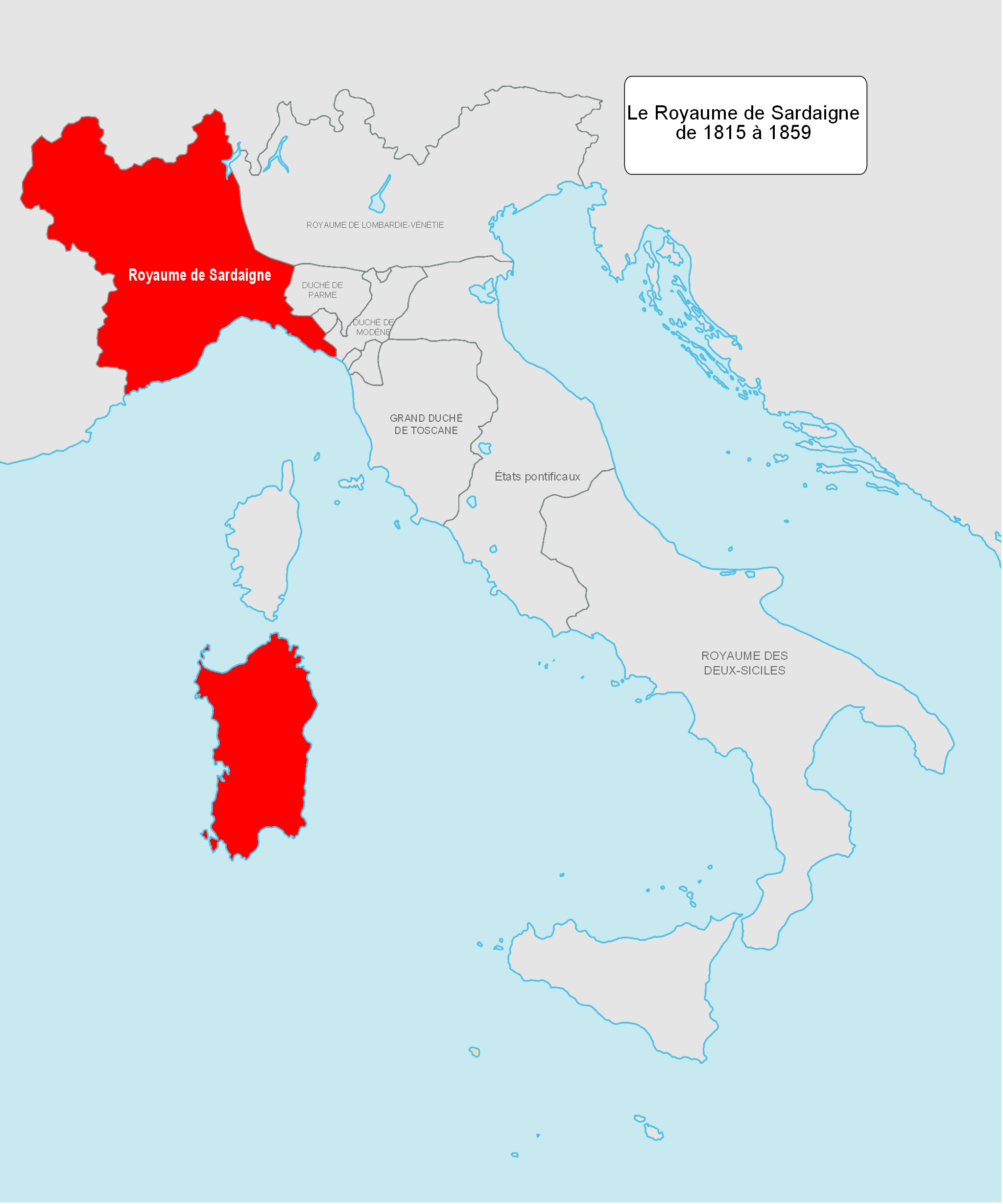 Royaume de Sardaigne 1515-1859